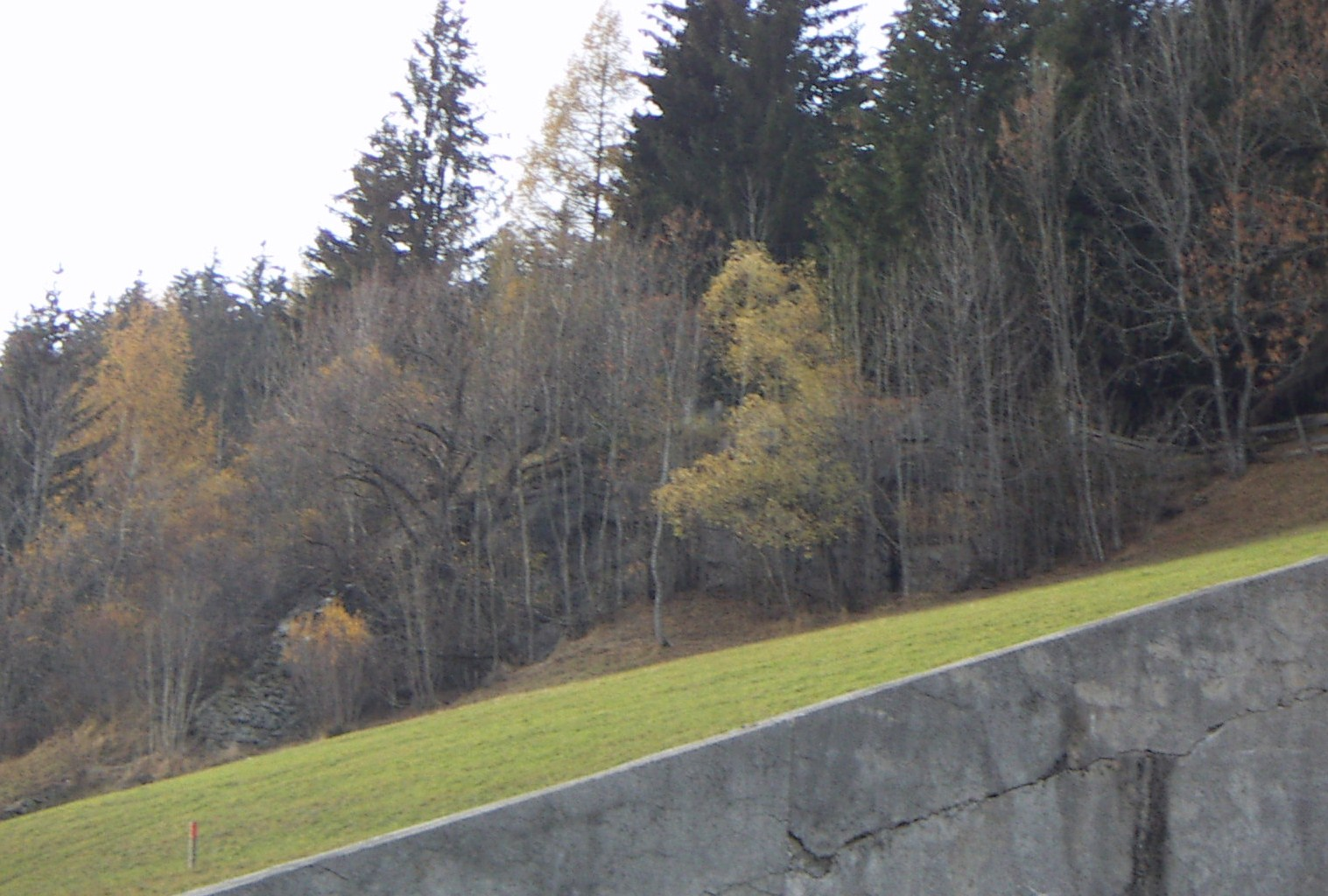 Opera 18, sbarramento versciaco